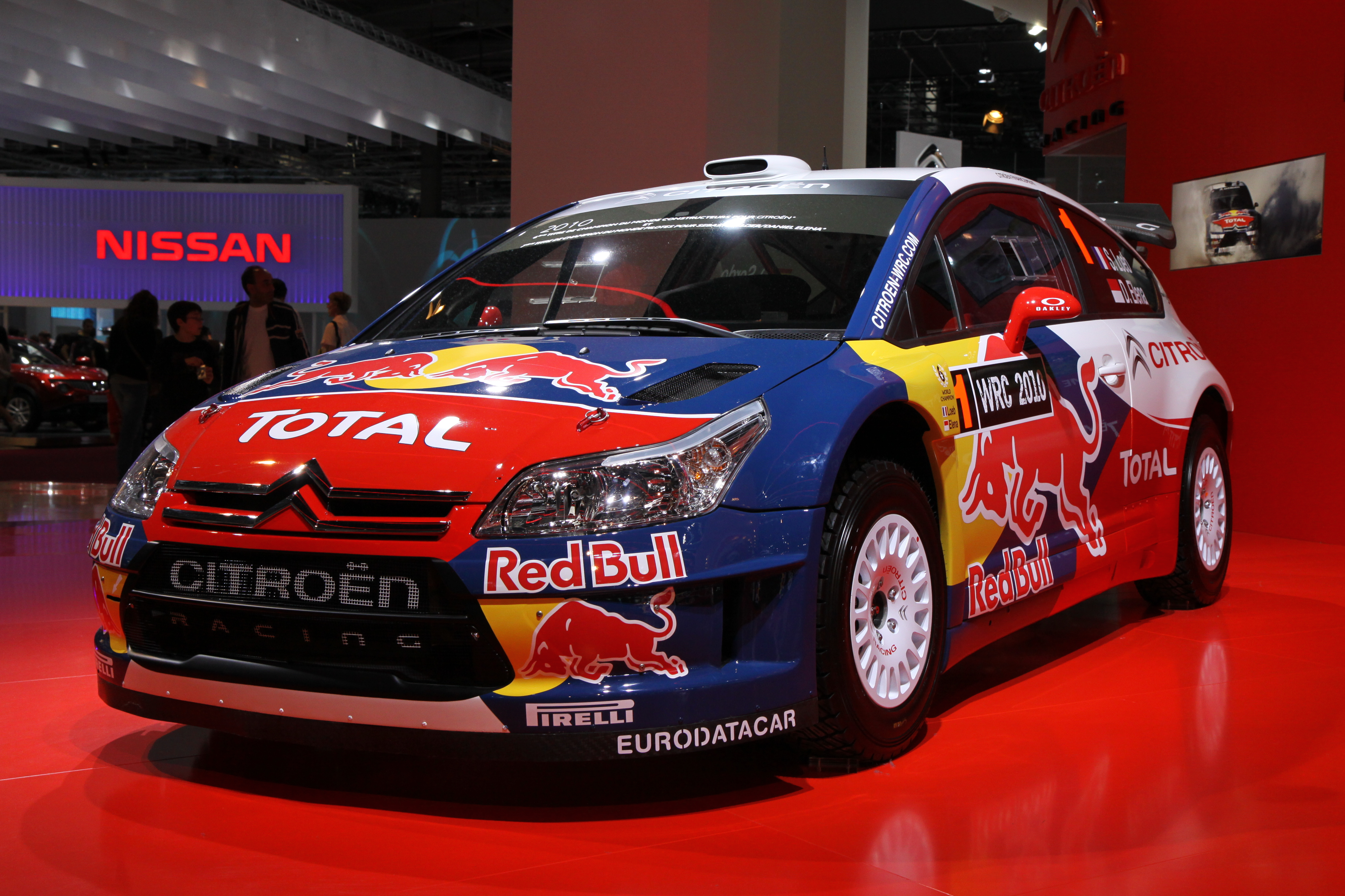 Závodní Citroën C4 WRC na autosalonu Mondial de l’Automobile de Paris